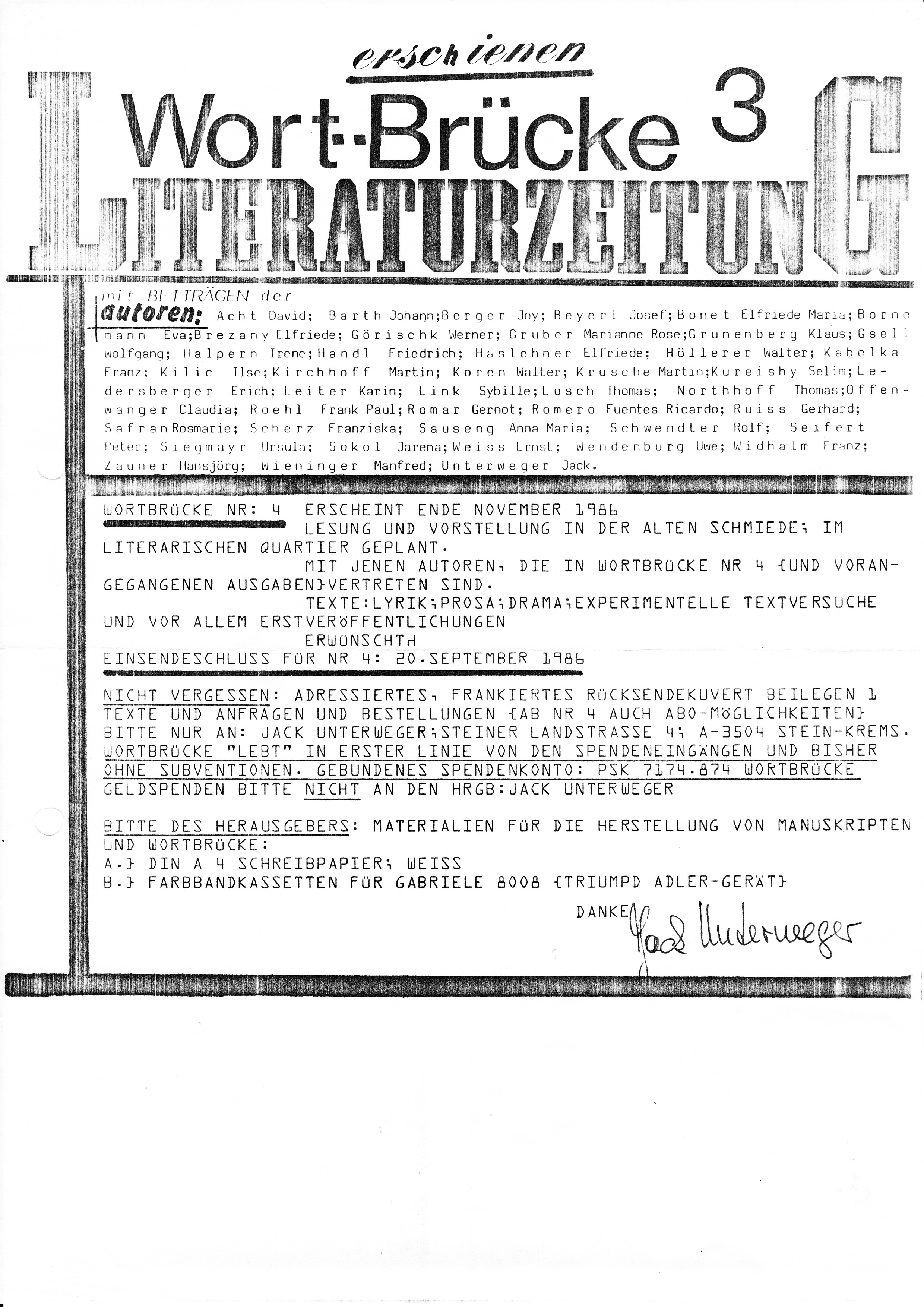 Scan eines Werbe-/Informations-Flugzettels betreffend die Literaturzeitschrift Wort-Brücke von Jack Unterweger; verfasst 1986 und unterzeichnet von Jack Unterweger. Nicht erurierbar, ob "Originalkopie" Unterwegers oder Kopie einer Kopie. Inhalt: Nennung der Autor/inn/en in der Ausgabe 3; Call for texts für Ausgabe 4; Bitte um finanzielle und materielle Spenden.